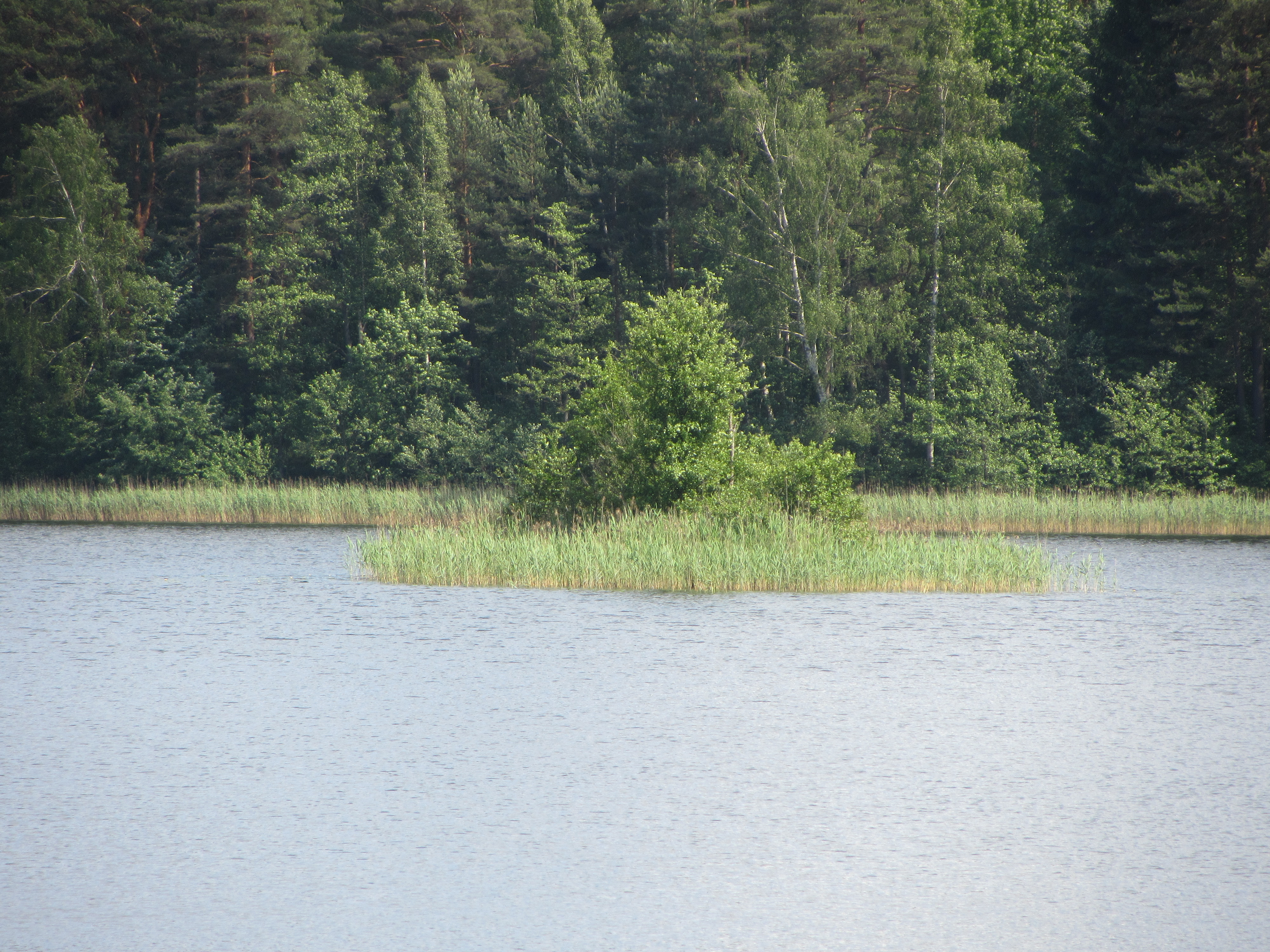 Degučių sen., Lithuania